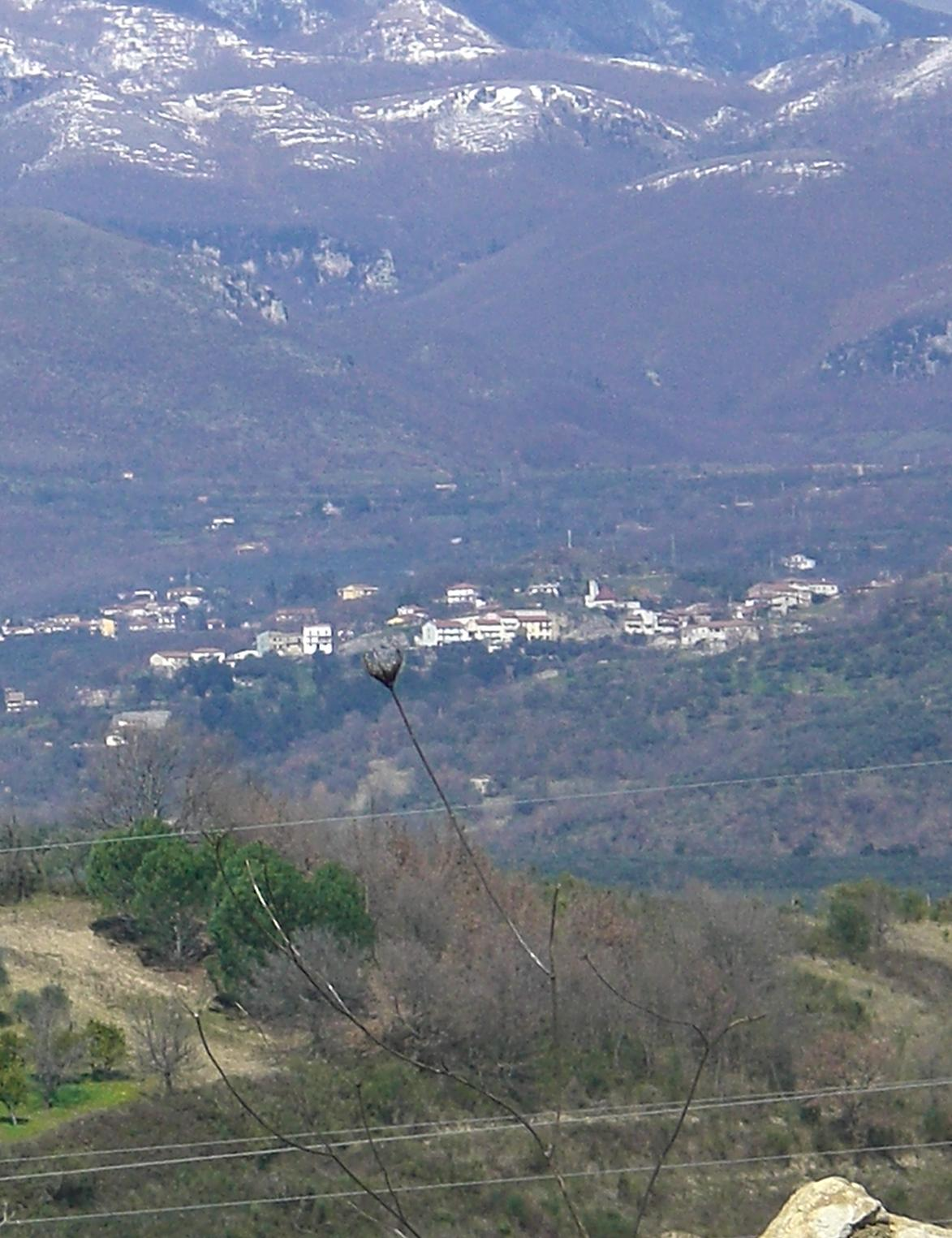 Panorama di Serradarce